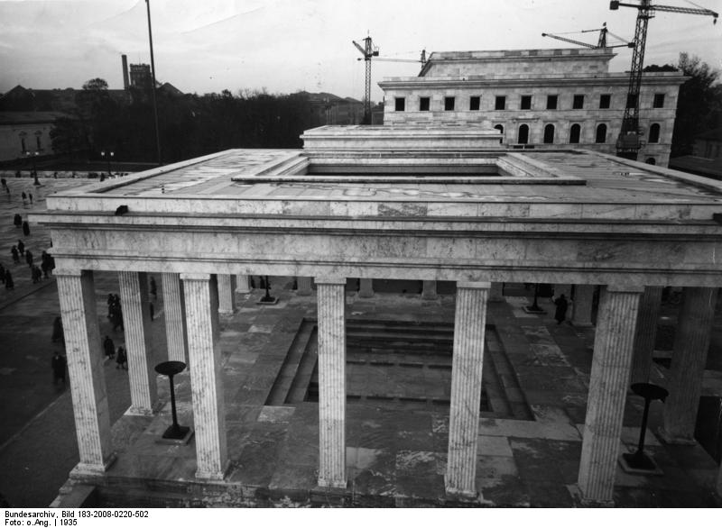 München, Ehrentempel und Führerhaus Die Bauten am Königsplatz in München. Blick auf die Ehrentempel und das Führerhaus.